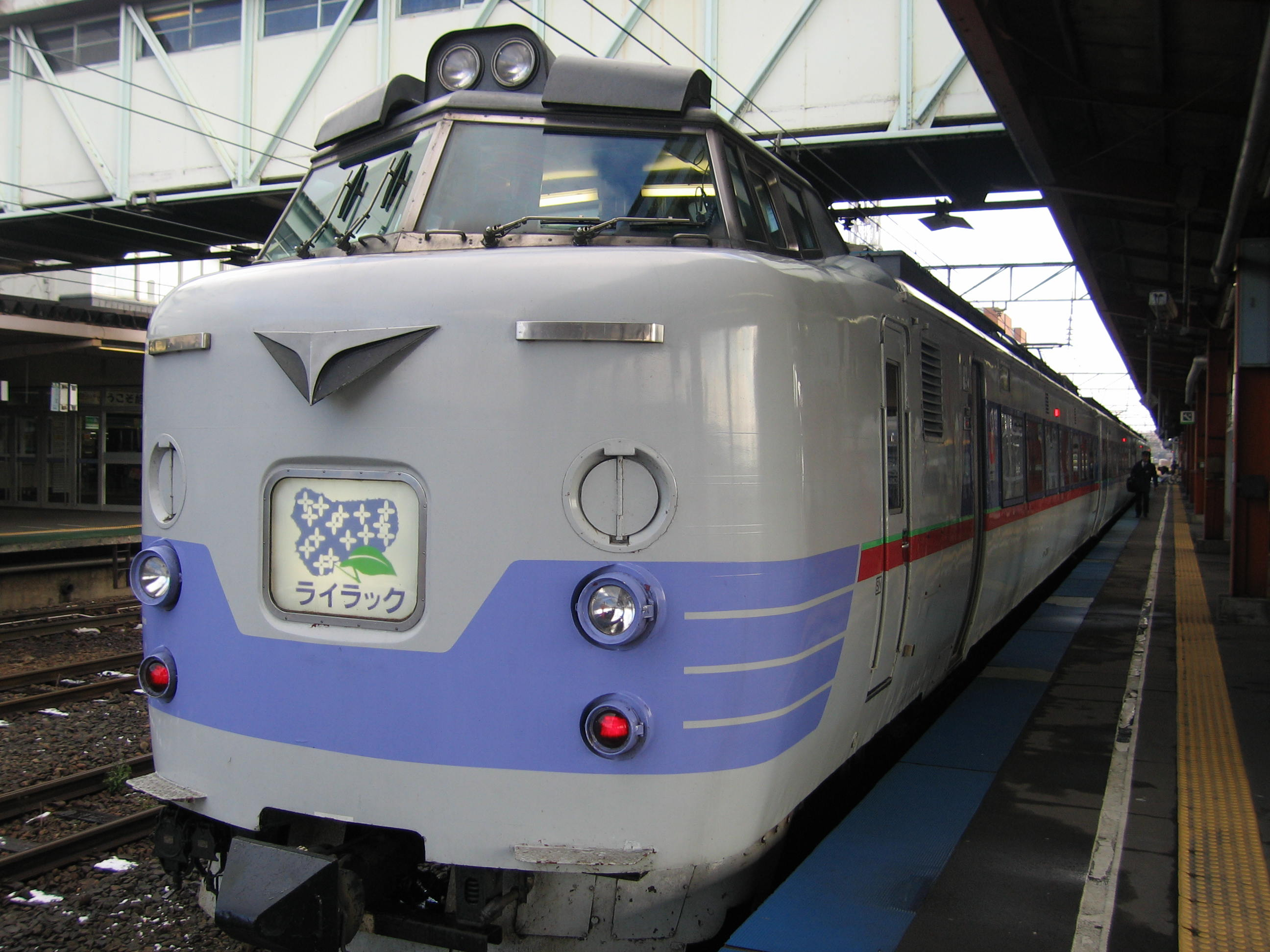 JR北海道781系電車(ライラック号として運用) JR Hokkaido 781(Operated as Lilac)